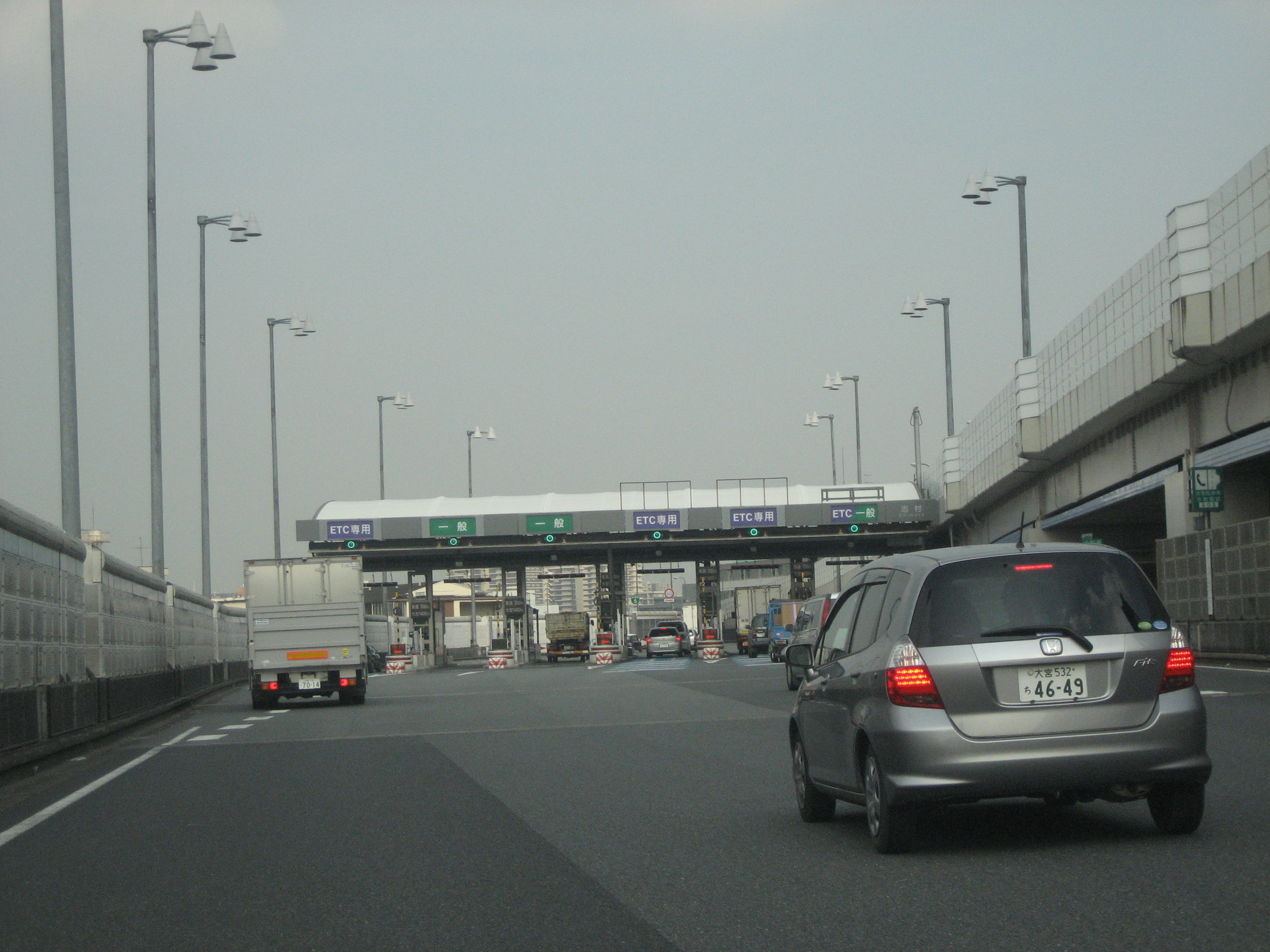 首都高速5号池袋線志村料金所